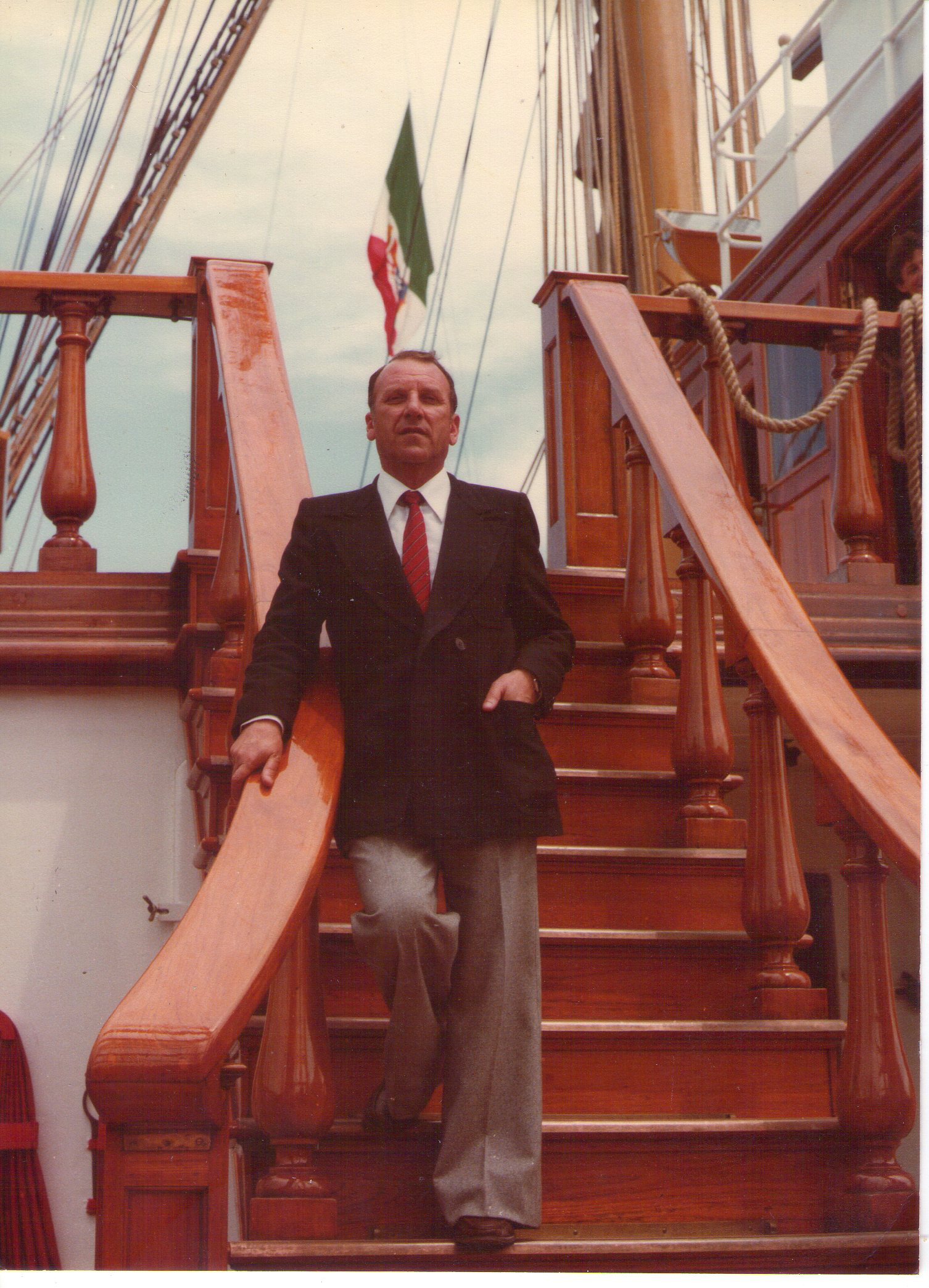 Dante Pignatiello